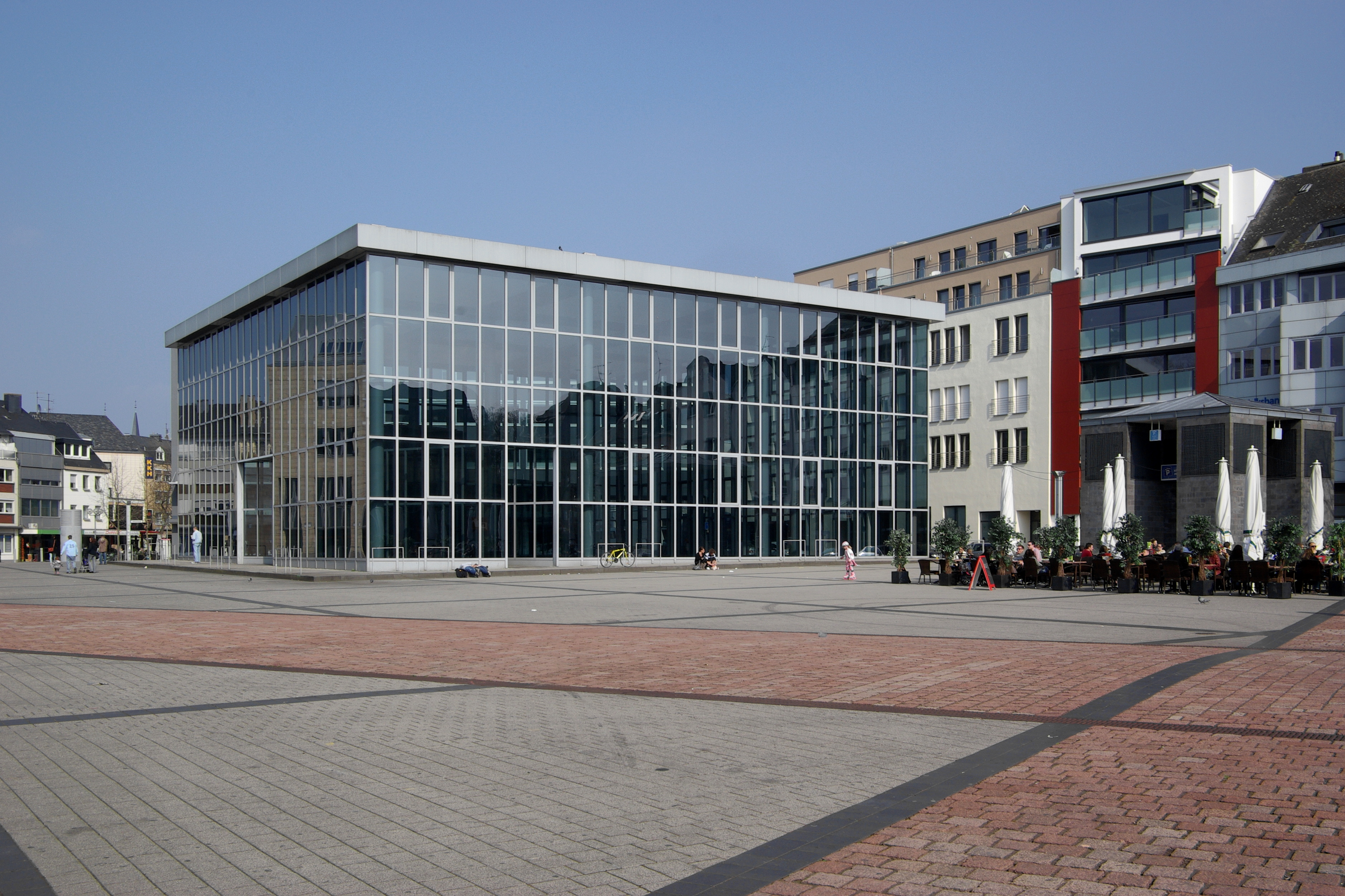 Trier, Thermenmuseum, Architekt: Oswald Mathias Ungers